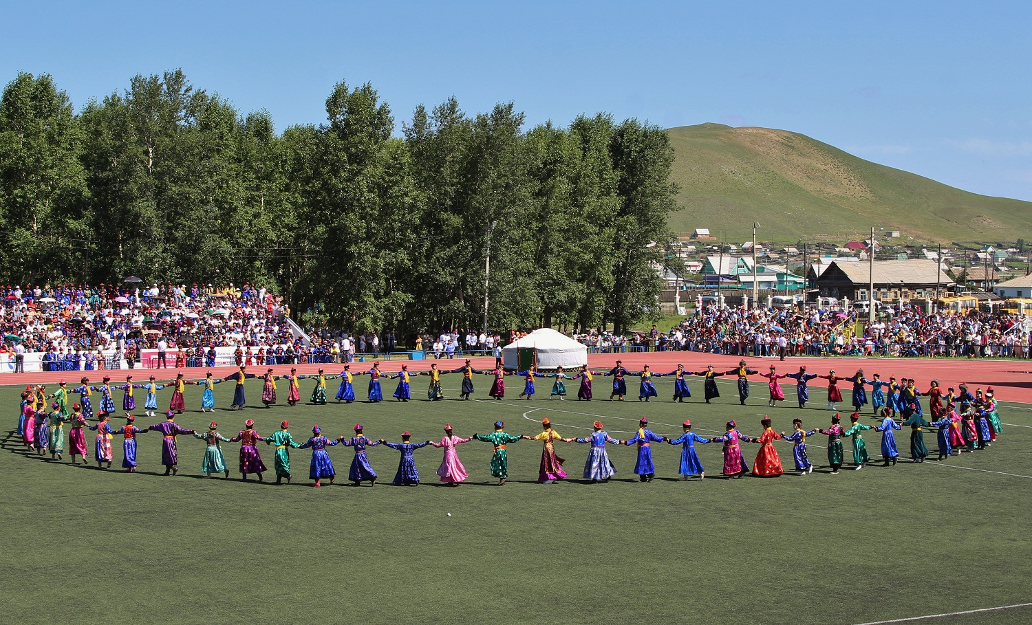 Ёхор - хороводный танец бурят. Церемония открытия фестиваля бурятской культуры "Алтаргана-2012". Агинское, Забайкальский край.